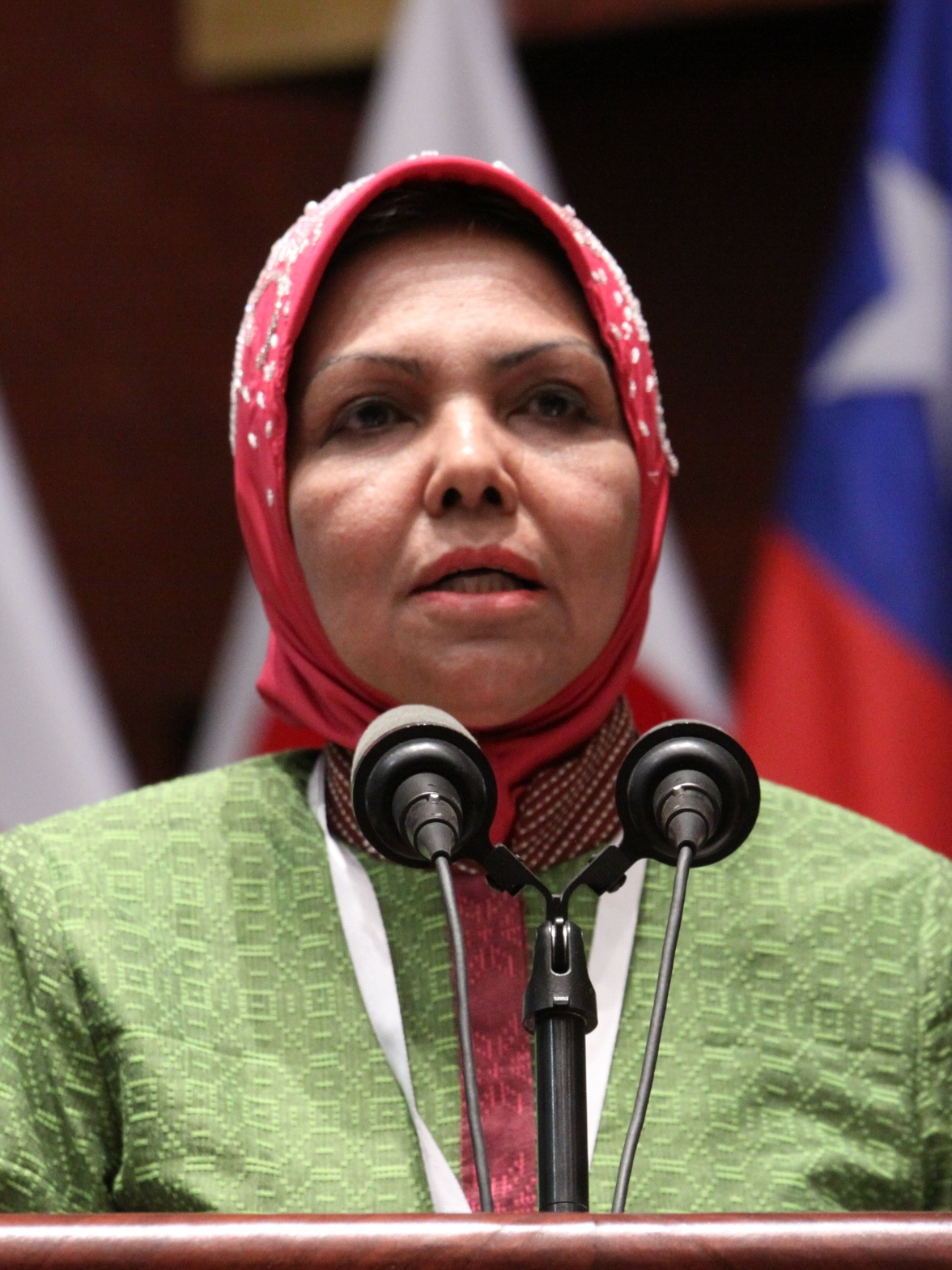 Quito, 12 enero de 2015.- Nurhayati All Assegaf de la Delegación de Indonesia interviene en la Primera sesión plenaria y situación internacional: Política y Seguridad Fotografía: Hugo Ortiz / Asamblea Nacional